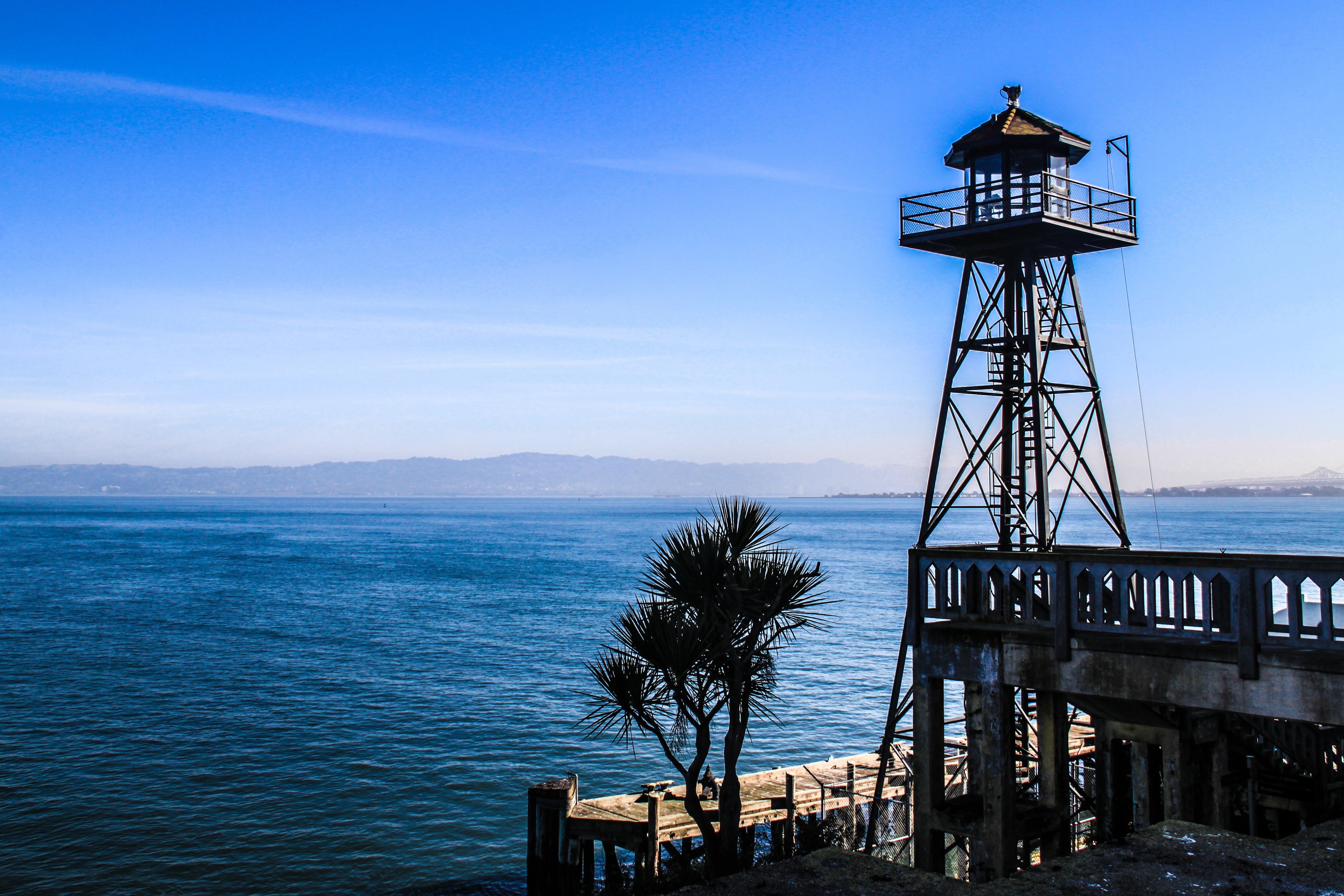 Alcatraz Watchtower